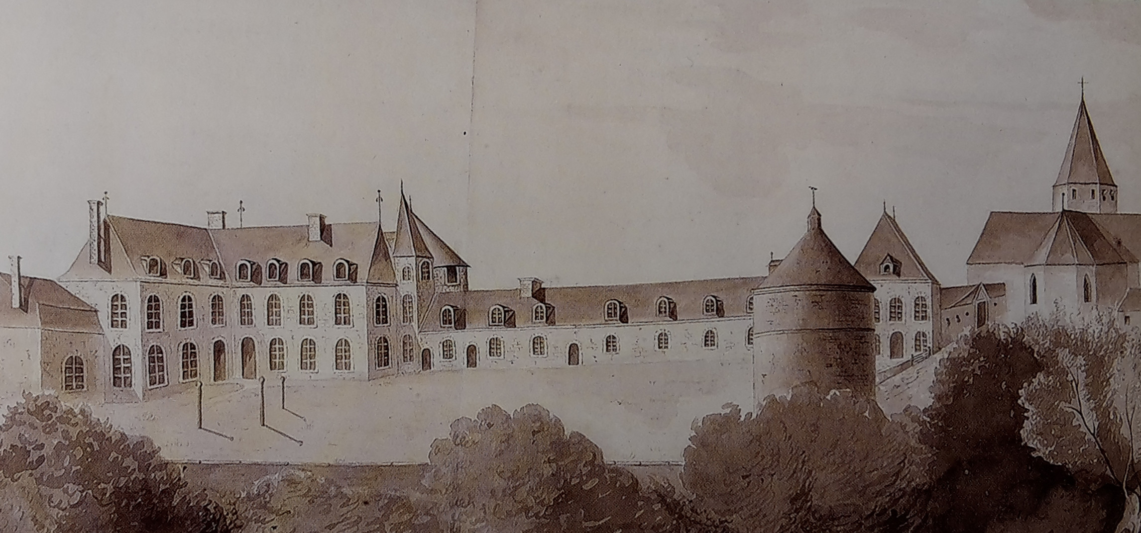 Ancien château de Challain-la-Potherie, Maine-et-Loire, France.